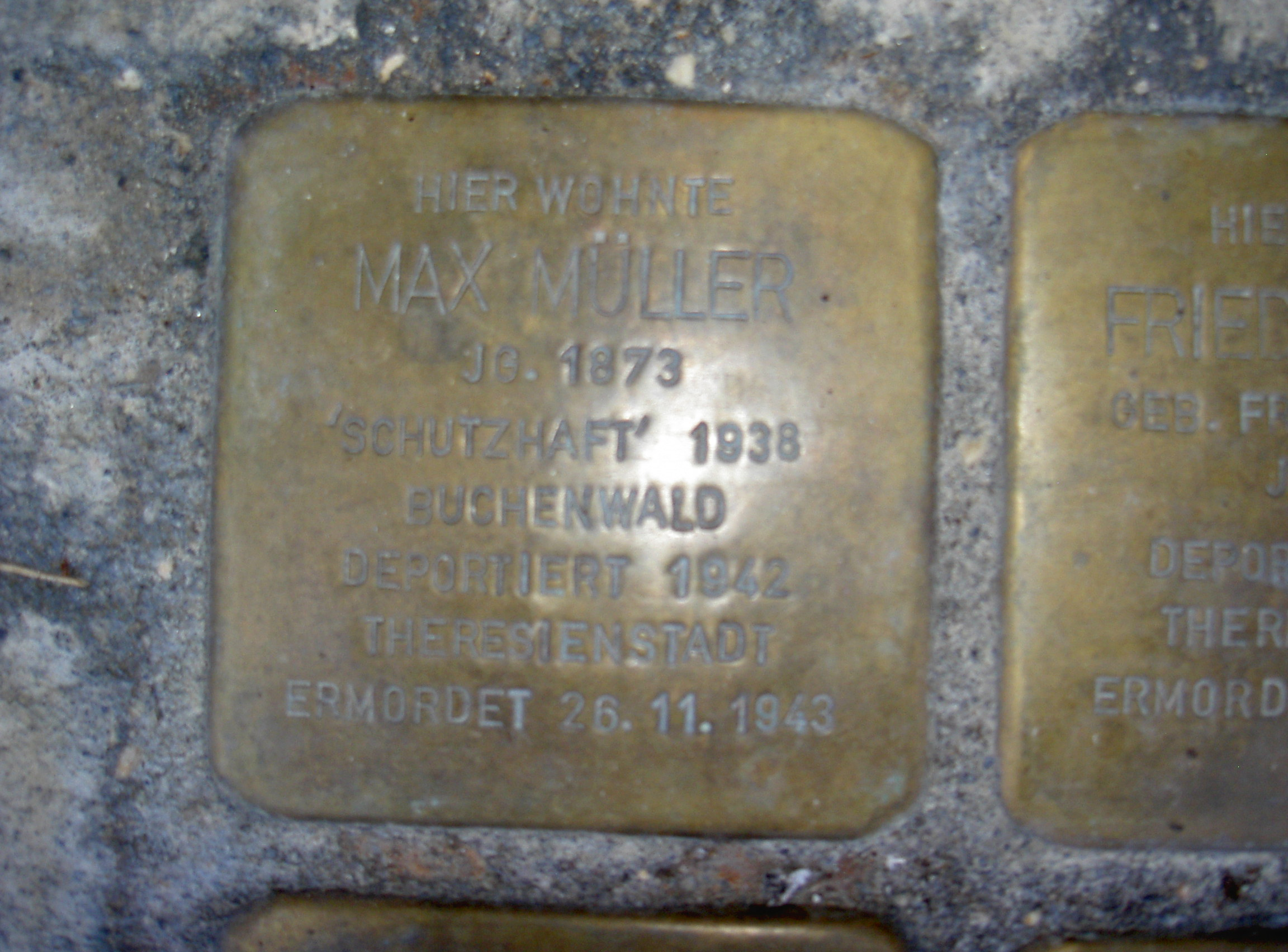 Stolperstein in Themar Müller Max